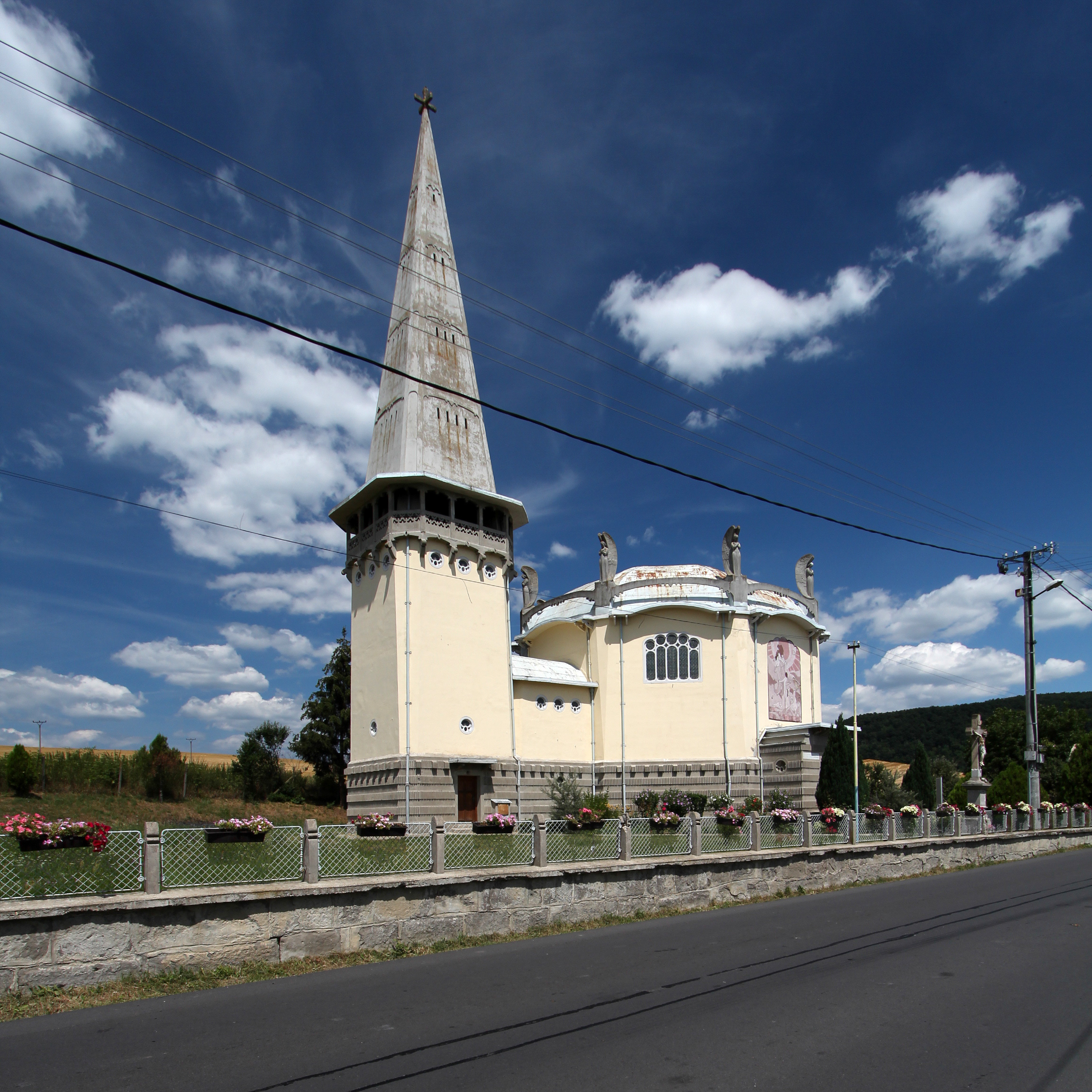 Kostol sv. Alžbety, Muľa (István Medgyaszay, 1910)